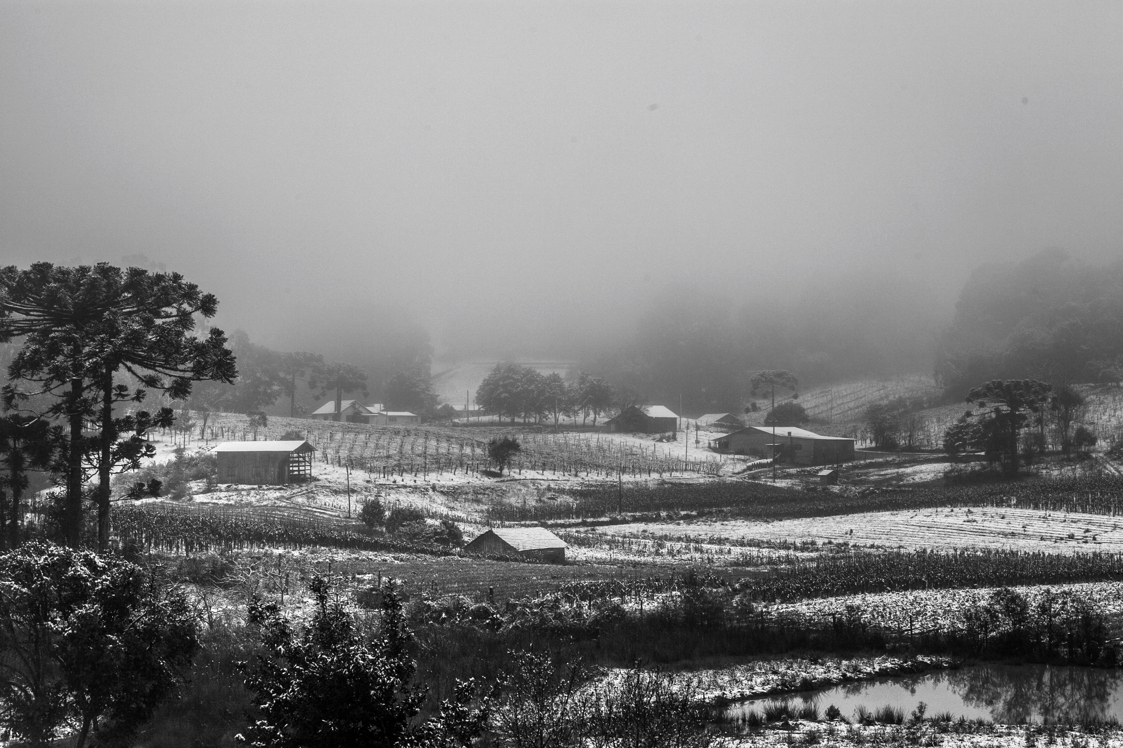 Neve em Caxias do Sul, Rio Grande do Sul.